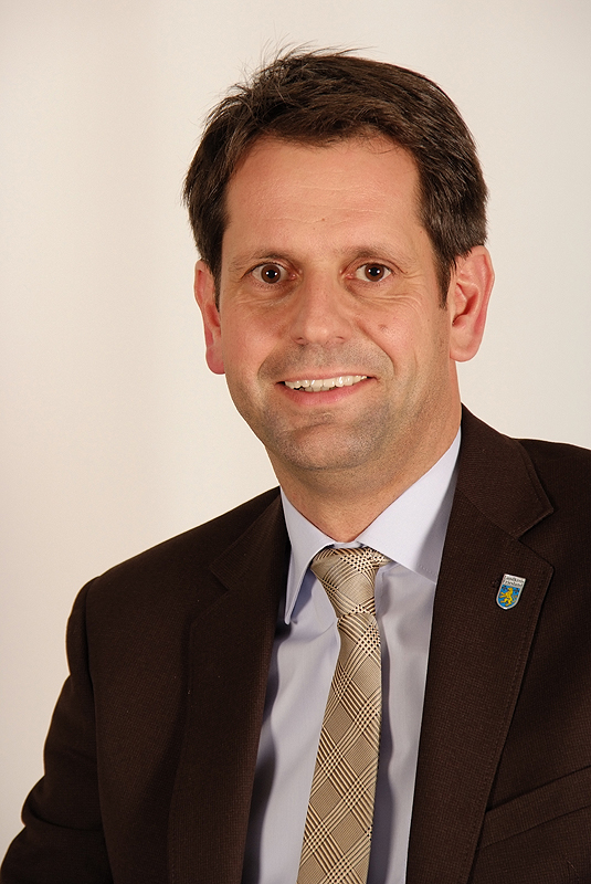 Olaf Lies, Landtagsabgeordneter Niedersachsen, 16. Wahlperiode (Fotoprojekt Landtagsabgeordnete Niedersachsen am 24. und 25. November 2009)